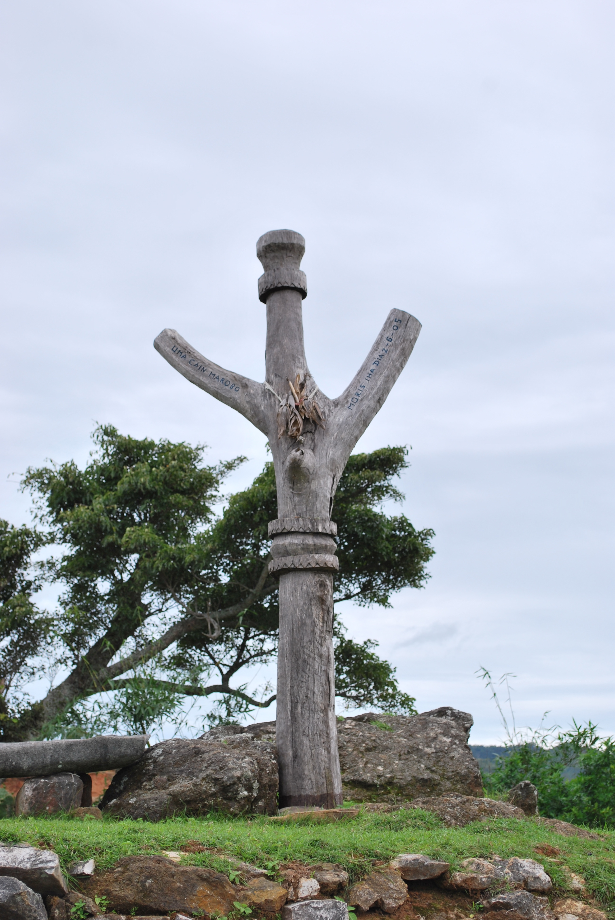 Totem in Hohulu, Maubisse, von Manuel Tilman aufgestellt.